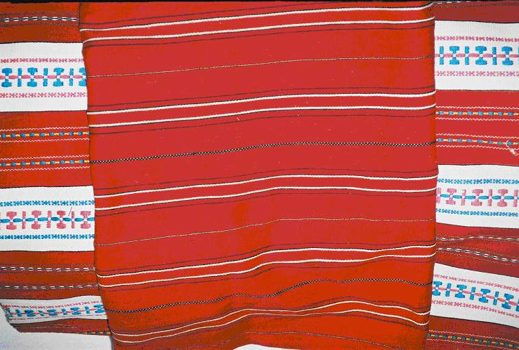 Rusinski vez